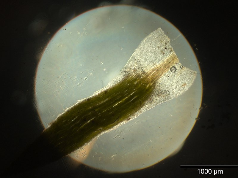 Große Filzmütze (Pogonatum urnigerum), Blattgrund, ~40x vergrößert